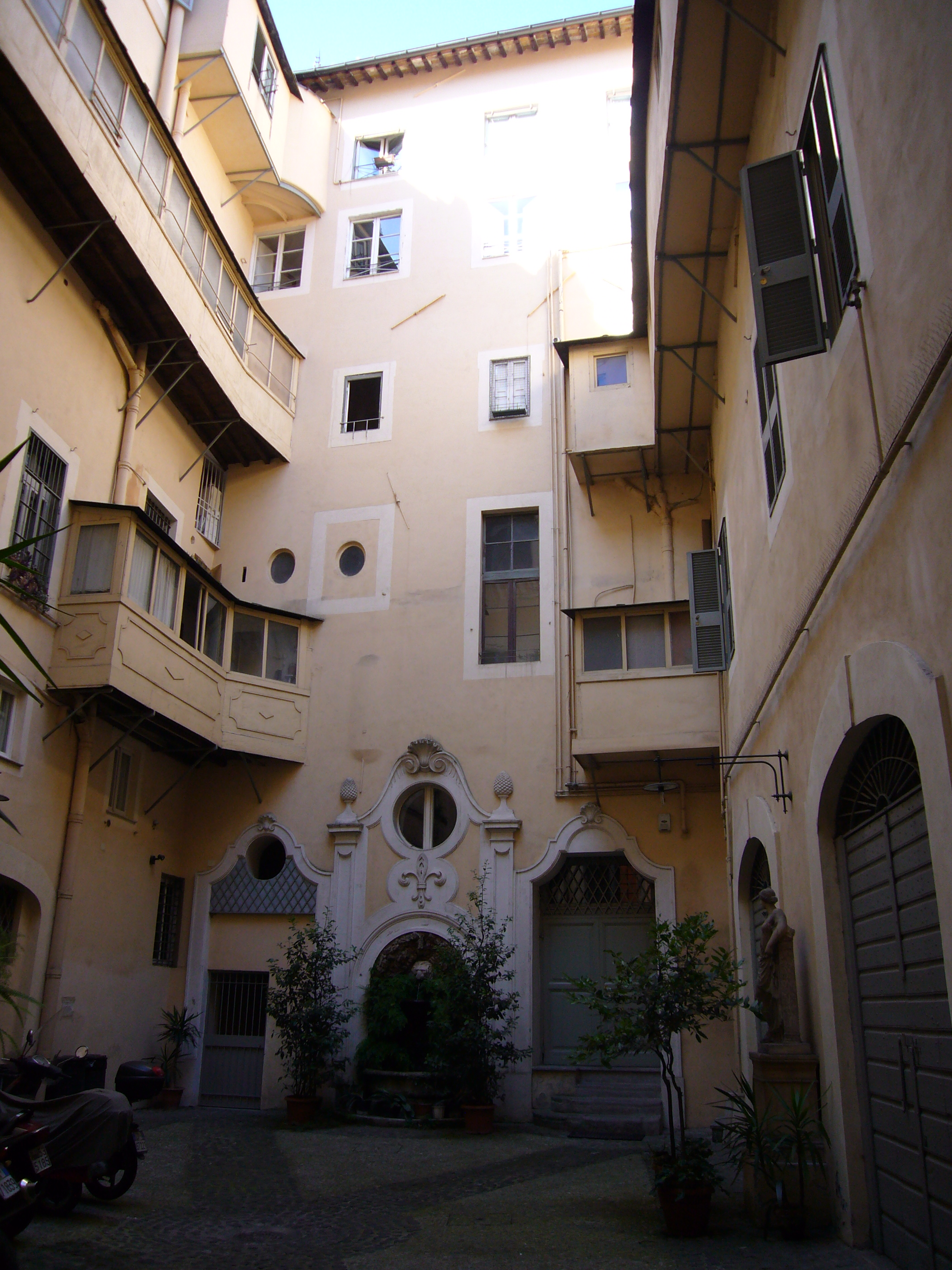 Roma, cortile di palazzo d'Aste Sterbini a via di Monserrato 149